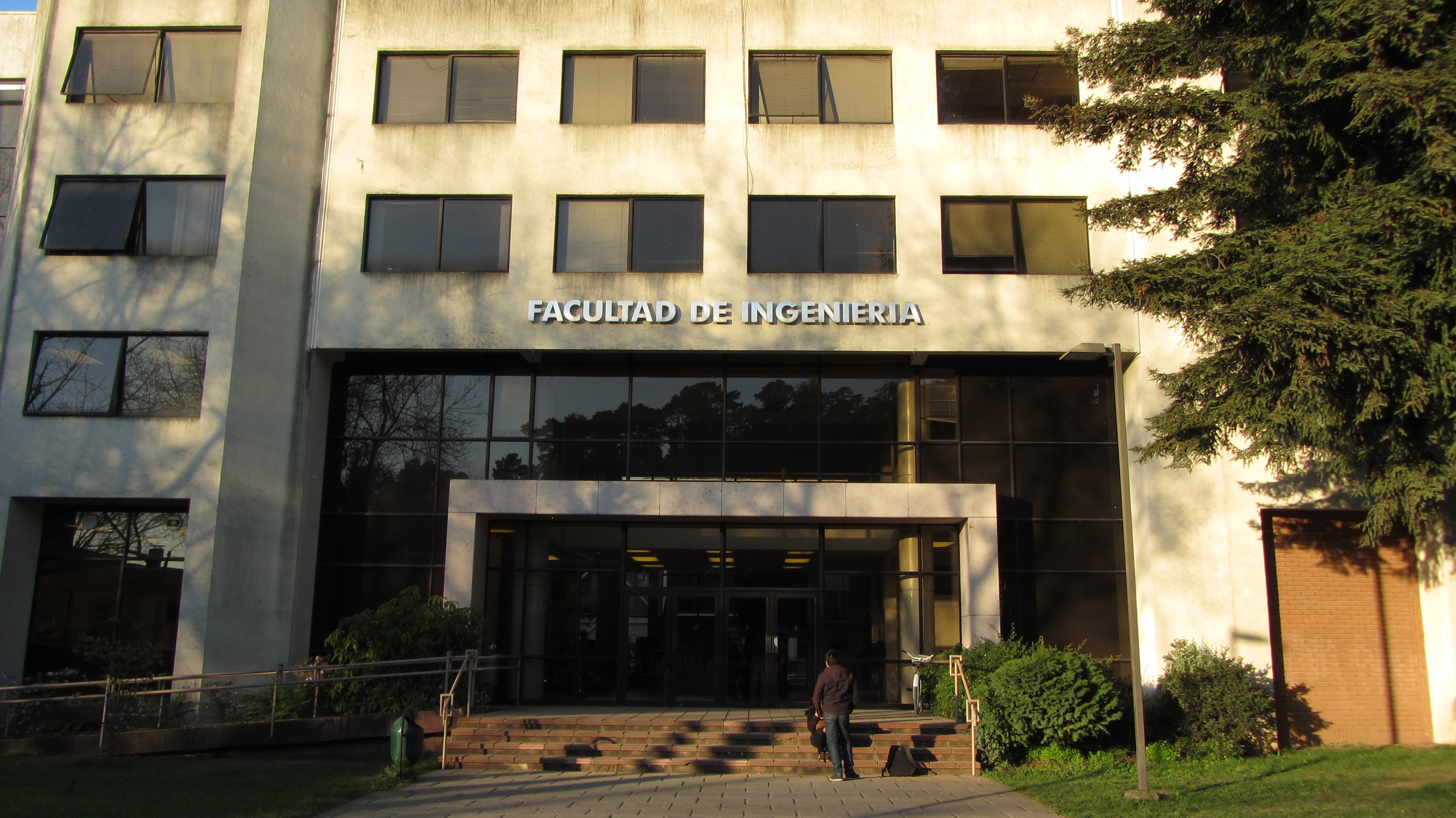 Facultad de Ingeniería de la Universidad de Concepción Concepción, Chile Septiembre de 2012